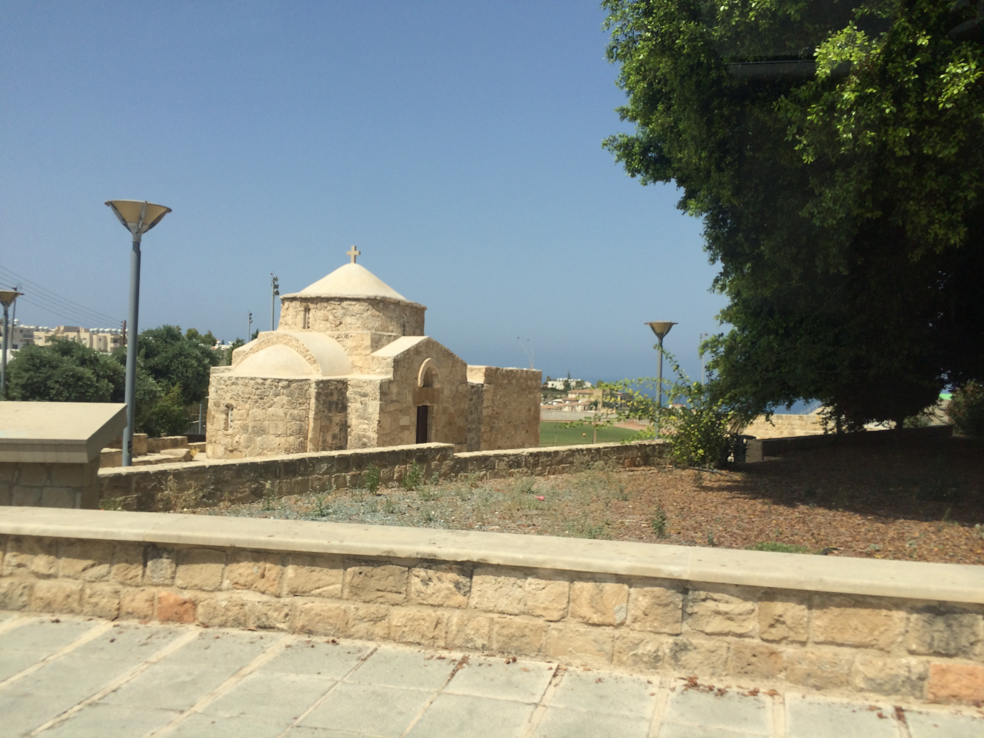 Chloraka, Cyprus